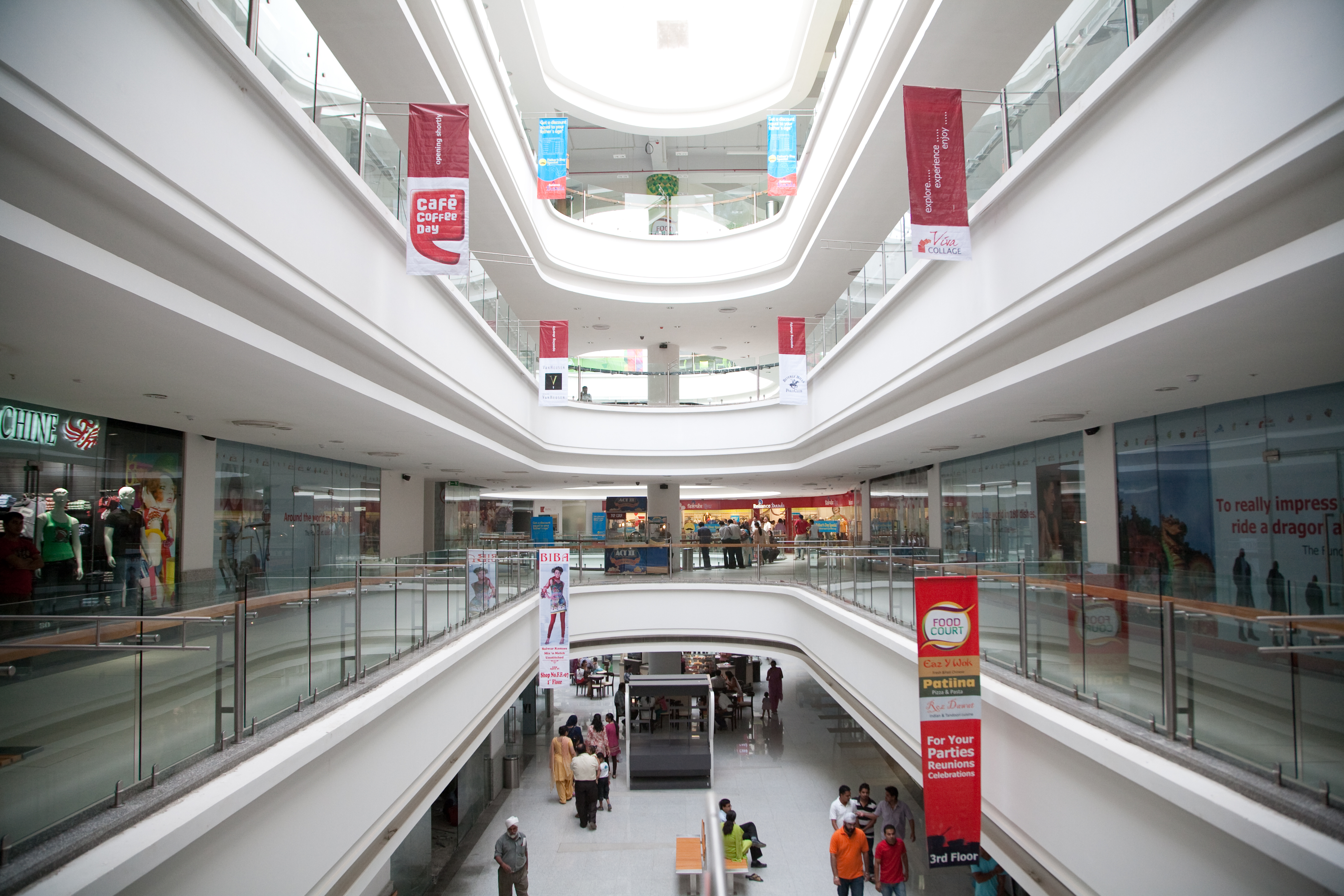 Viva Collage Mall, Jalandhar, Punjab, India